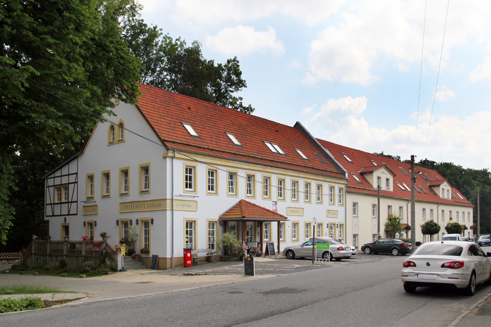 Liegau-Augustusbad Rittergut saniert